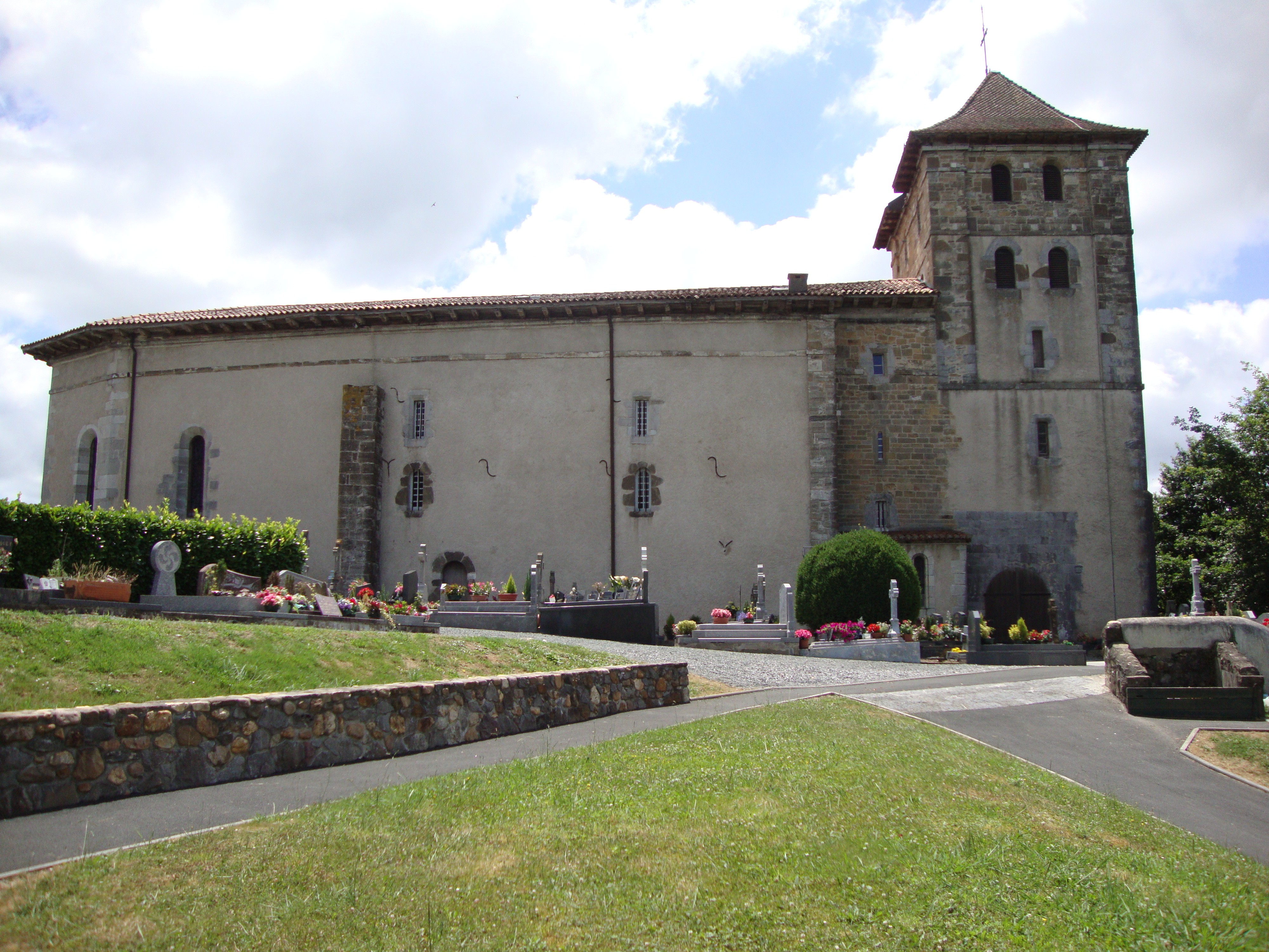 Espelette (Pyr-Atl., Fr) église et un part de la partie nouvelle du cimetière. On aperçoit parmi les tombes quelques stèles basques recentes.